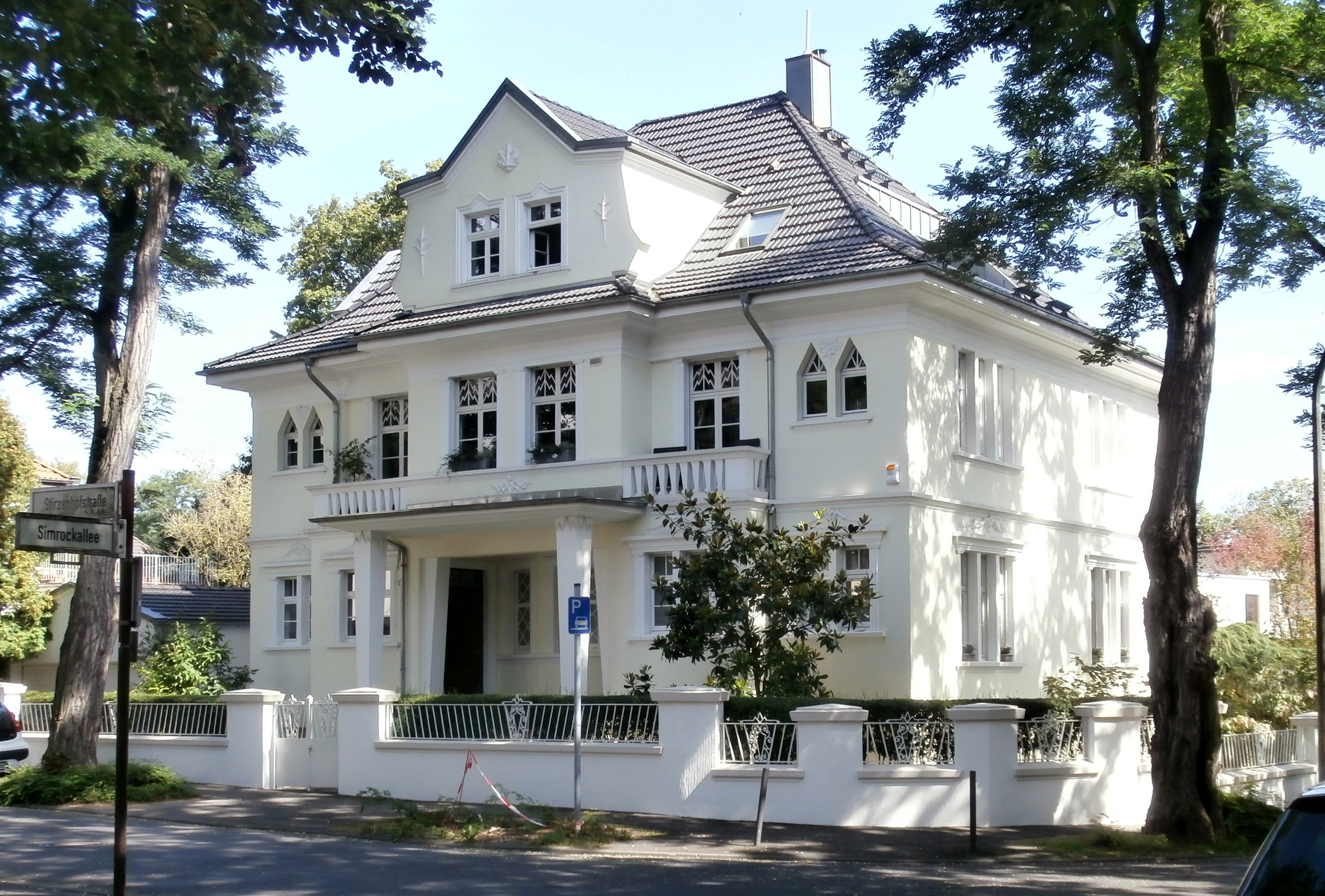 Villa, Stirzenhofstraße 21, Bonn-Plittersdorf